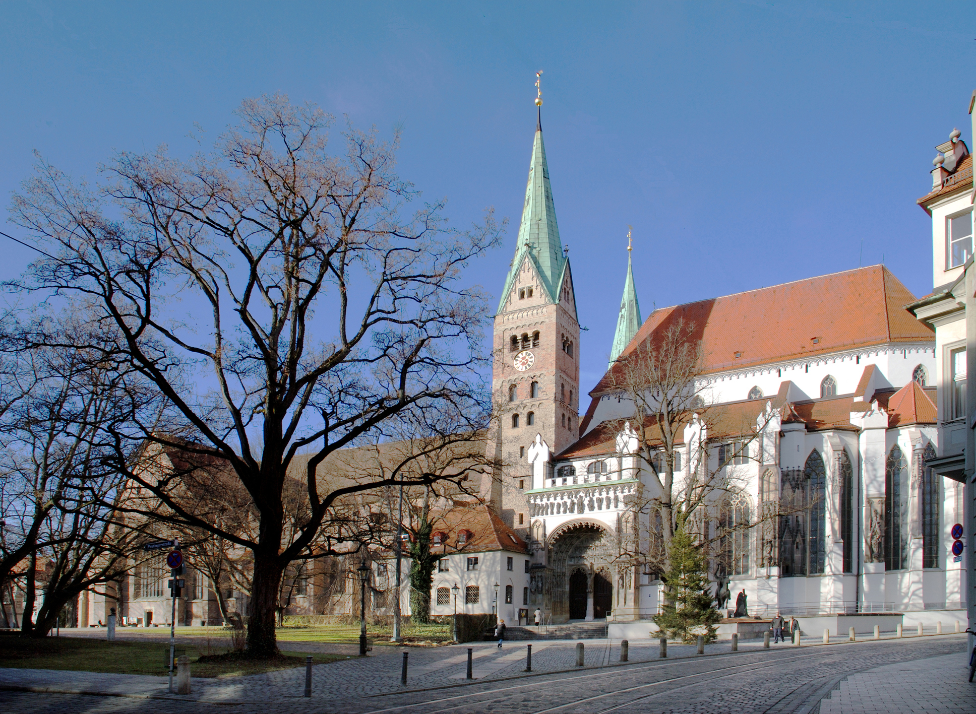 Der Augsburger Dom, eine fünfschiffige Basilika, ist 113 m lang und 40 m breit. Der Dom ist die Kathedrale des Bistums Augsburg und Stadtpfarrkirche der Dompfarrei Zum Heiligsten Herzen Jesu.